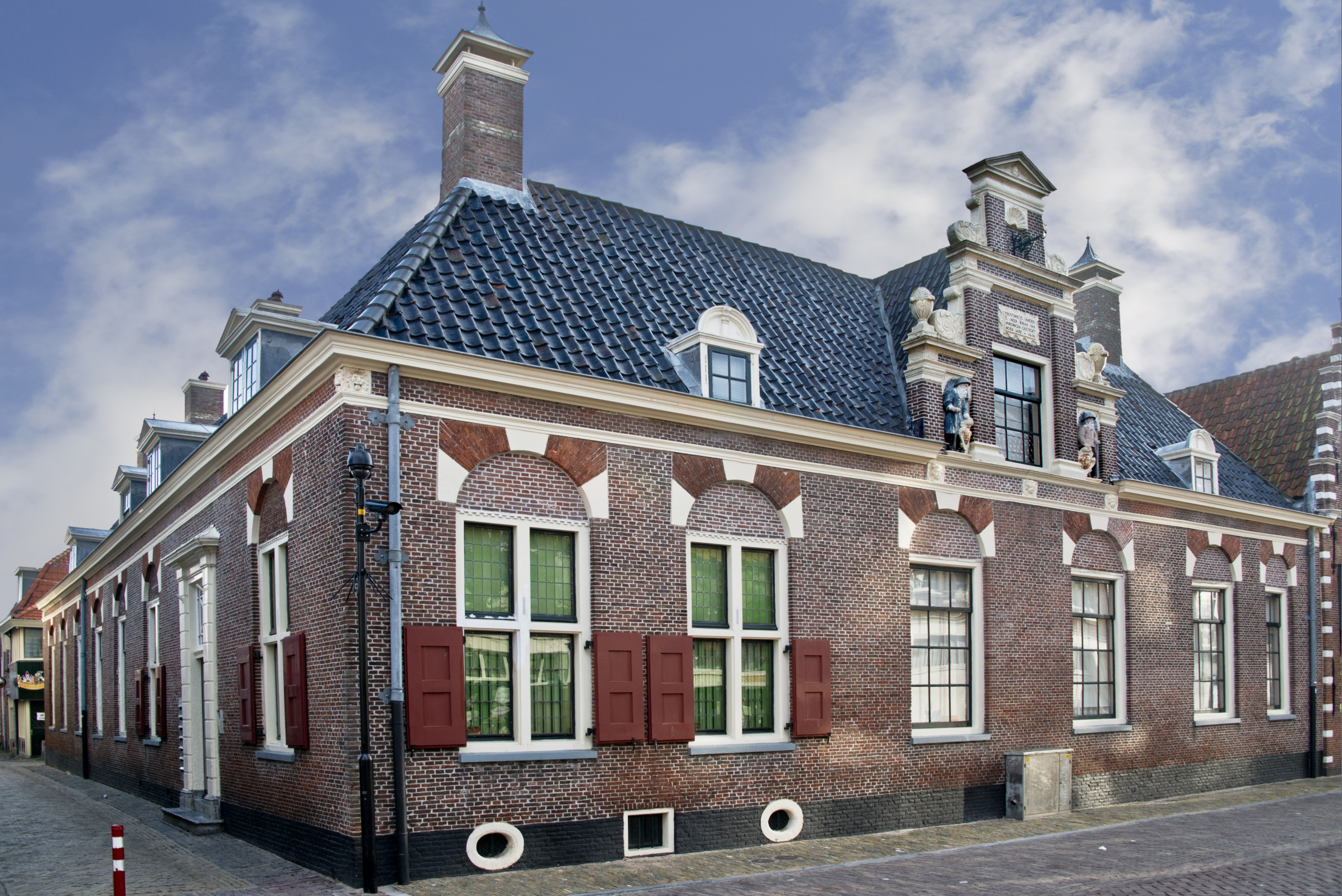 Het Huis van Achten of het Provenhuis van Johan van Nordingen aan de Gedempte Nieuwesloot in Alkmaar.